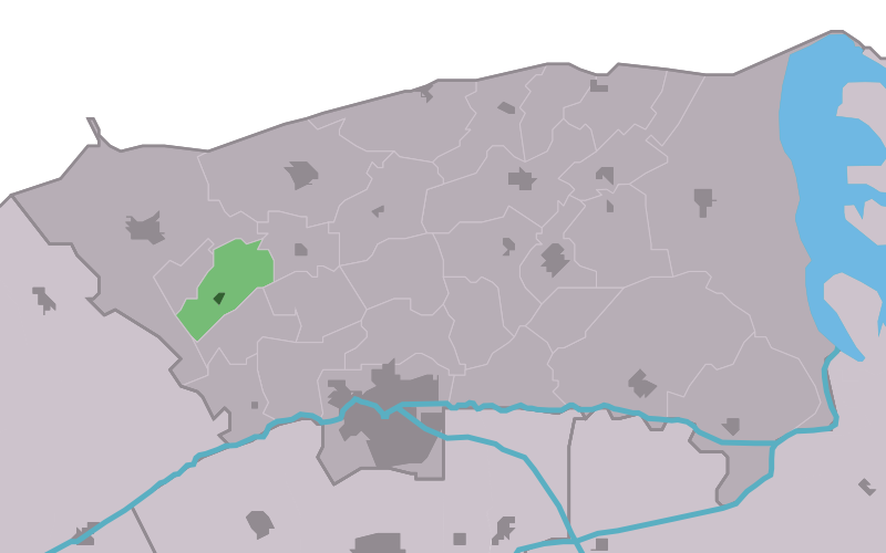 Kaartsje fan himrik fan Brantgum